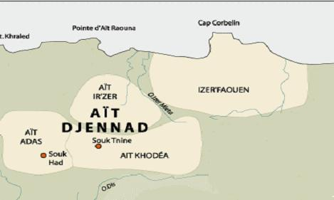 Carte géographique